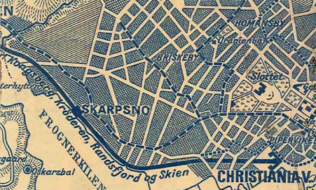 Skøyenlinjen på eldre sporveiskart.